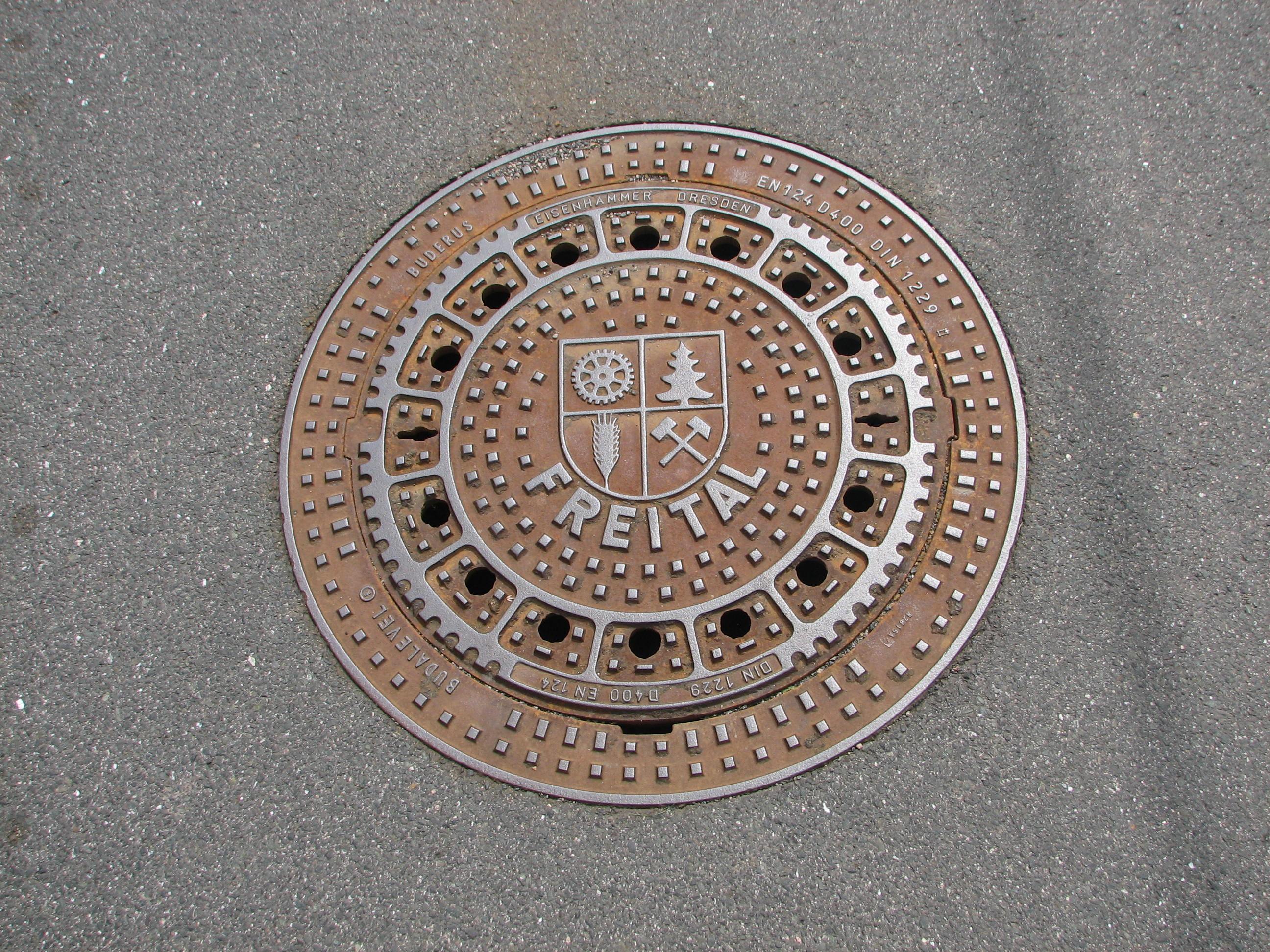 Gullydeckel aus dem Eisenhammer Dresden mit dem Freitaler Stadtwappen. Diese Art von Deckeln wurde an vielen Stellen der Stadt verwendet. Dieser befindet sich am Schafberg. Eisenhammer Dresden/Buderus Budalevel